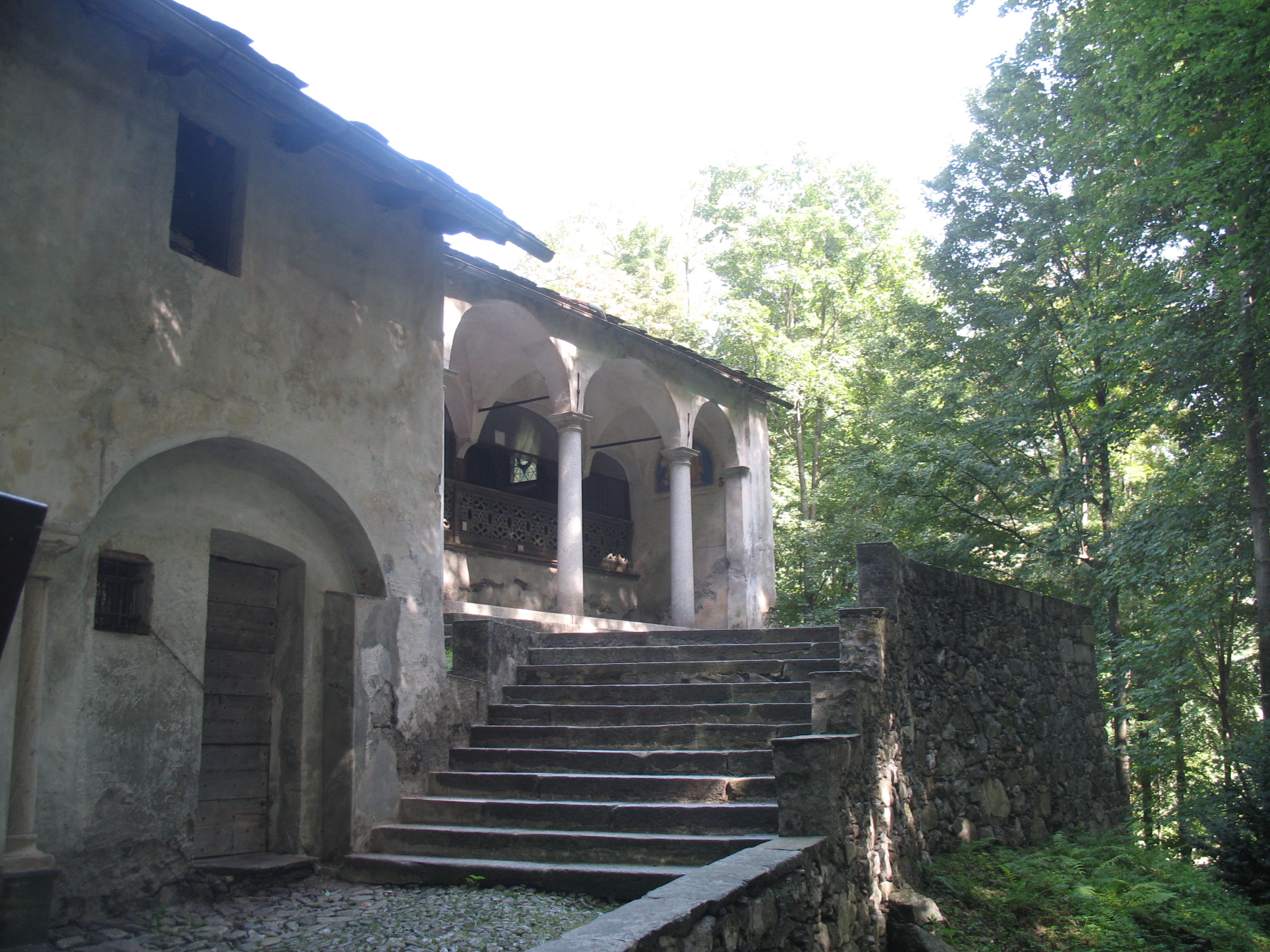 Sacro Monte di Varallo, Vercelli, Italia. Gruppo cappelle dette dell'Annunciazione (II, III e IV) - parco della Riserva naturale speciale del sacro Monte di Varallo.